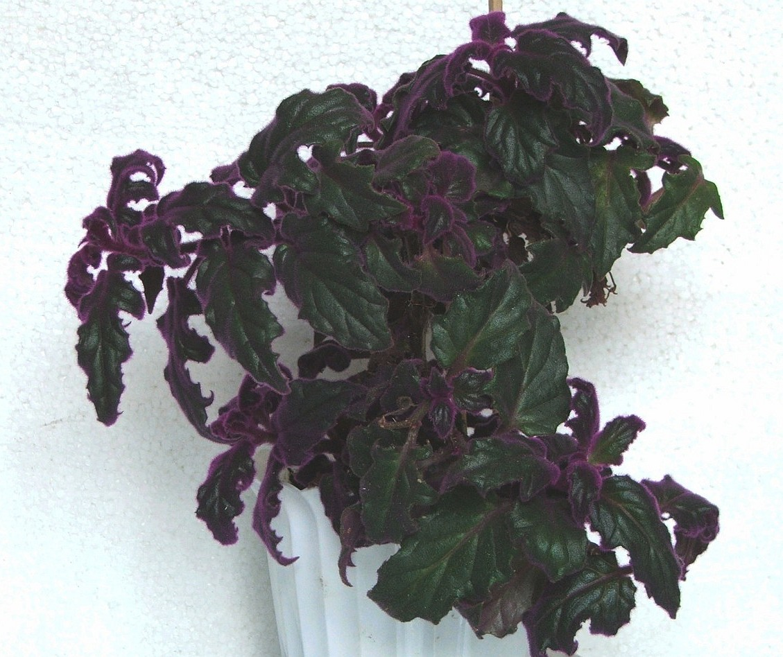 Gynura elegans Gynura sarmentosa, identified by User:Nandan Kalbag.